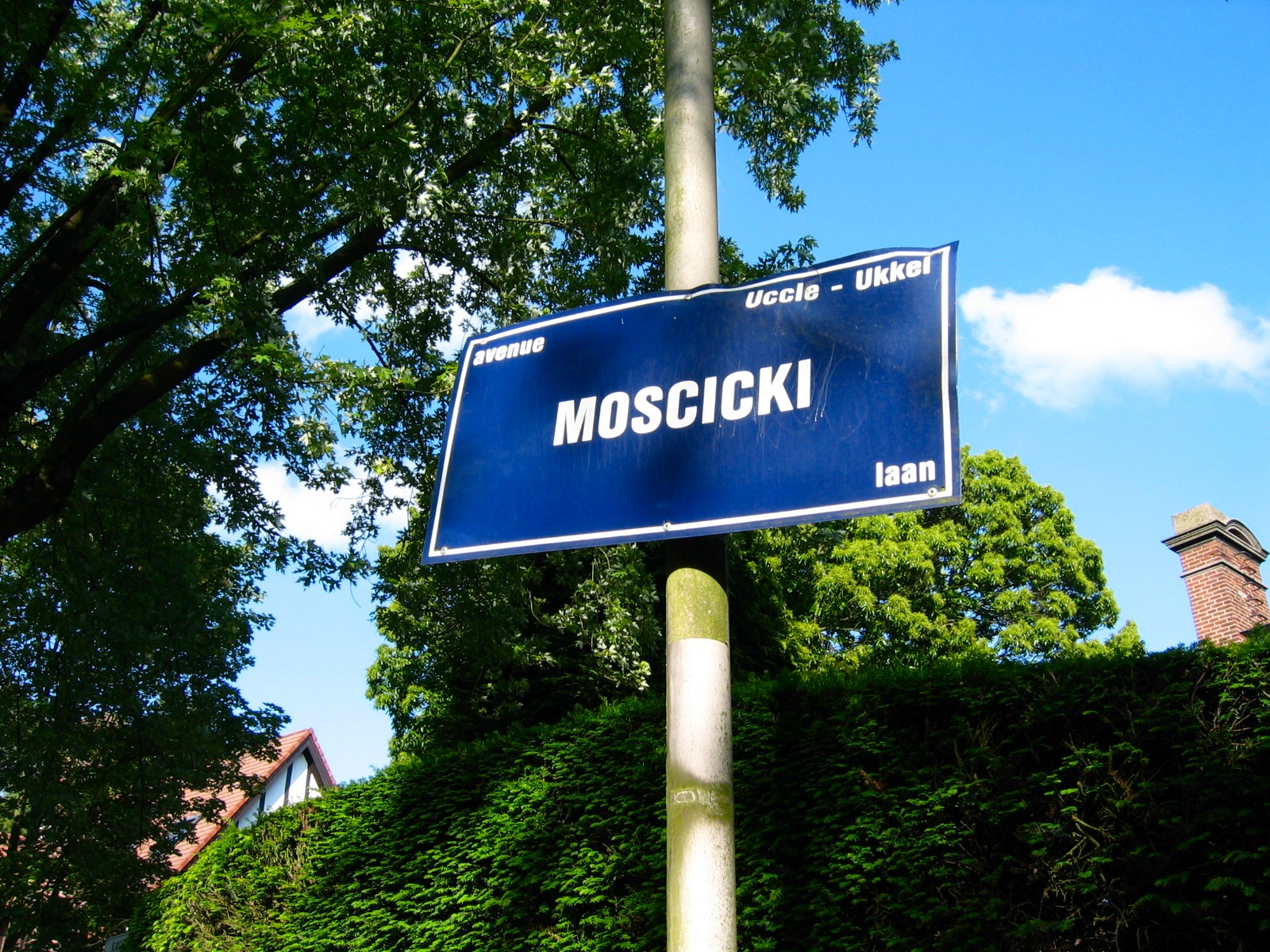 President Mościcki Avenue in Uccle (Brussels)/Aleja Prezydenta Mościckiego w Brukseli